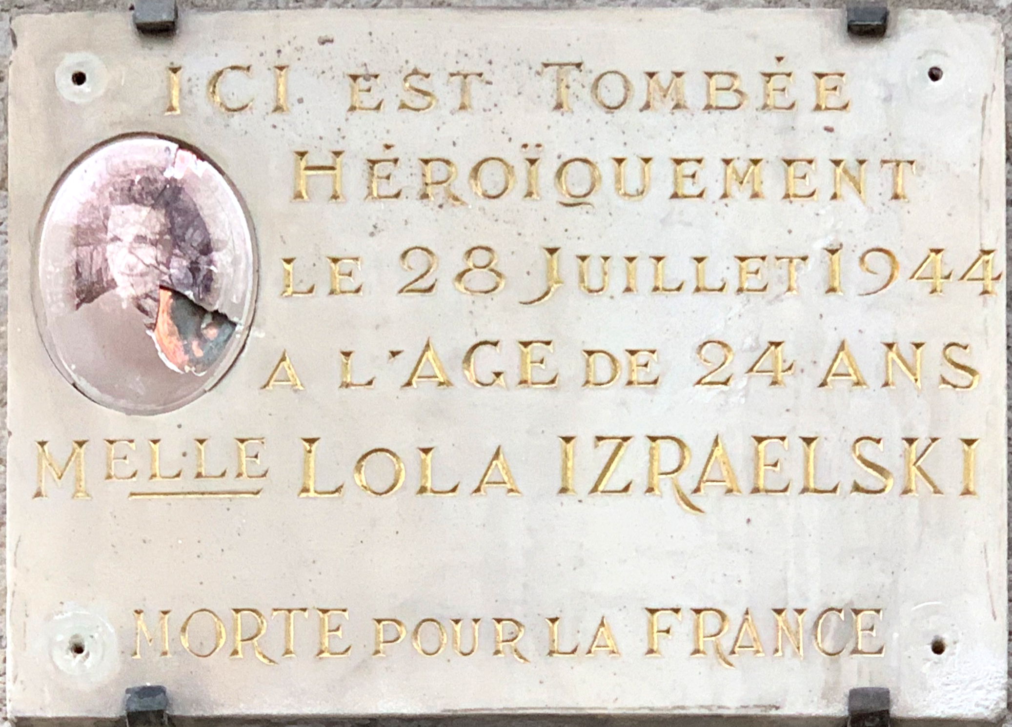 Plaque en hommage à Lola Israelski, Place Croix-Paquet. recto in engraving: ICI EST TOMBEE HEROIQUEMENT LE 28 JUILLET 1944 A L'AGE DE 24 ANS MELLE LOLA ISRAELSKI MORTE POUR LA FRANCE